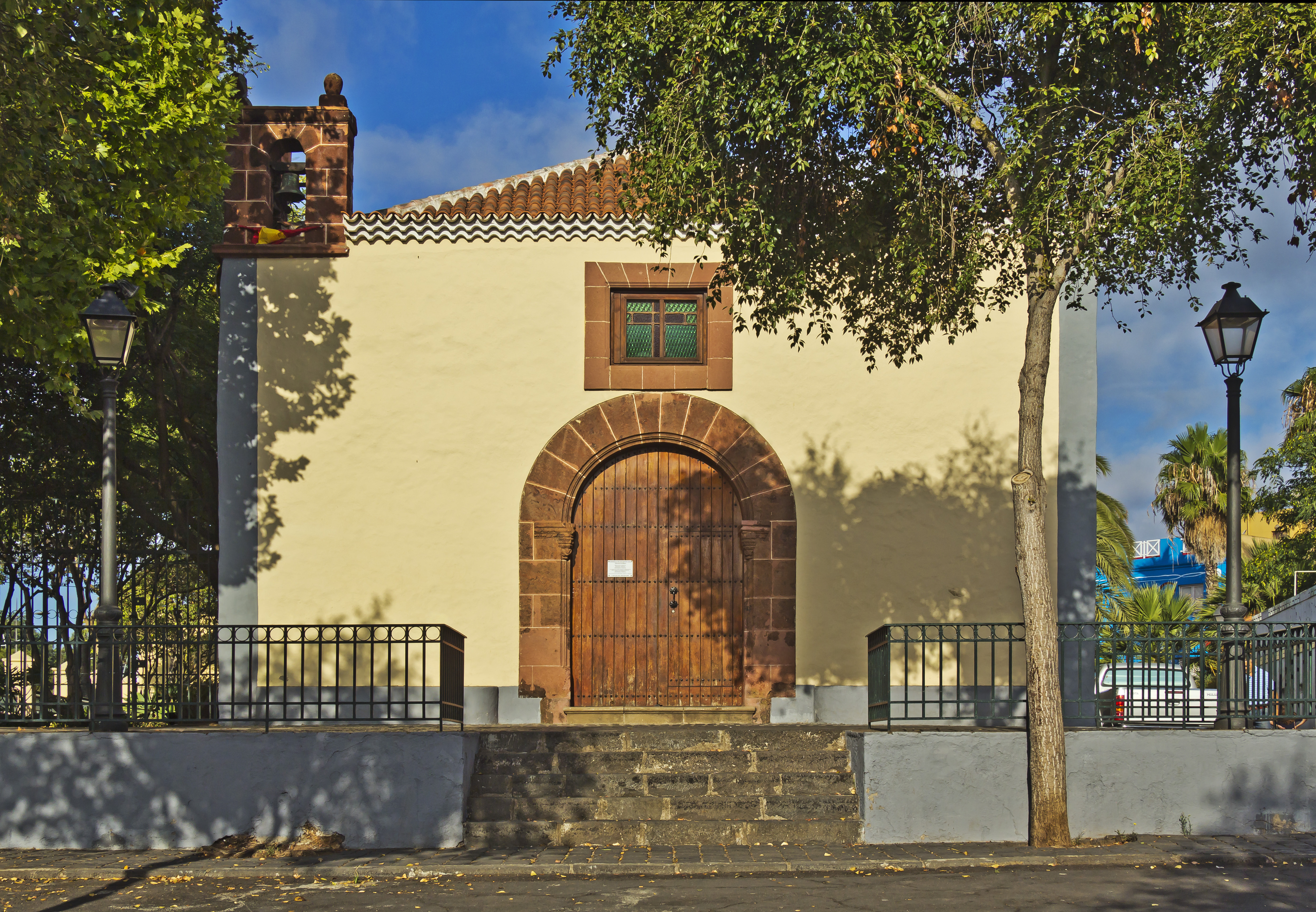 Die Kirche San Benito Abad in San Cristóbal de La Laguna hat ihre Ursprünge im 16. Jahrhundert.